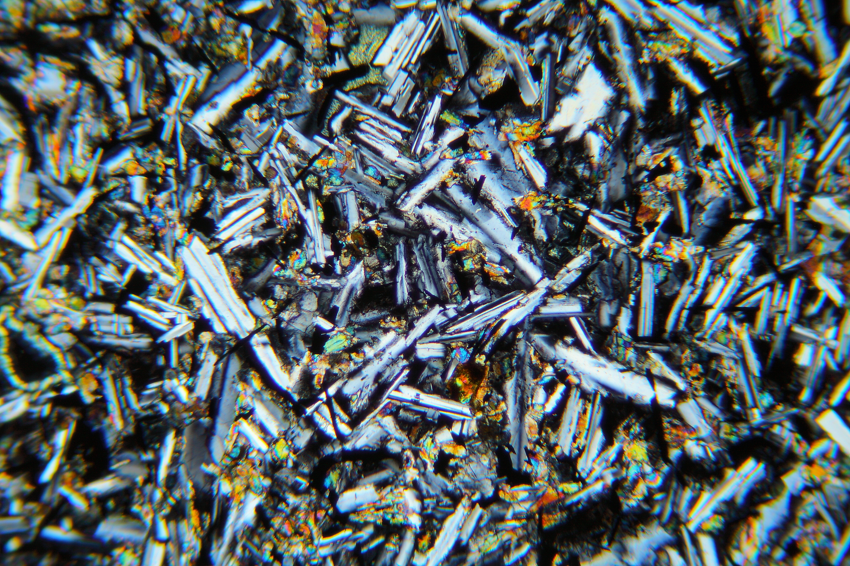 Tholeiitischer Basalt im Dünnschliff (XPL)